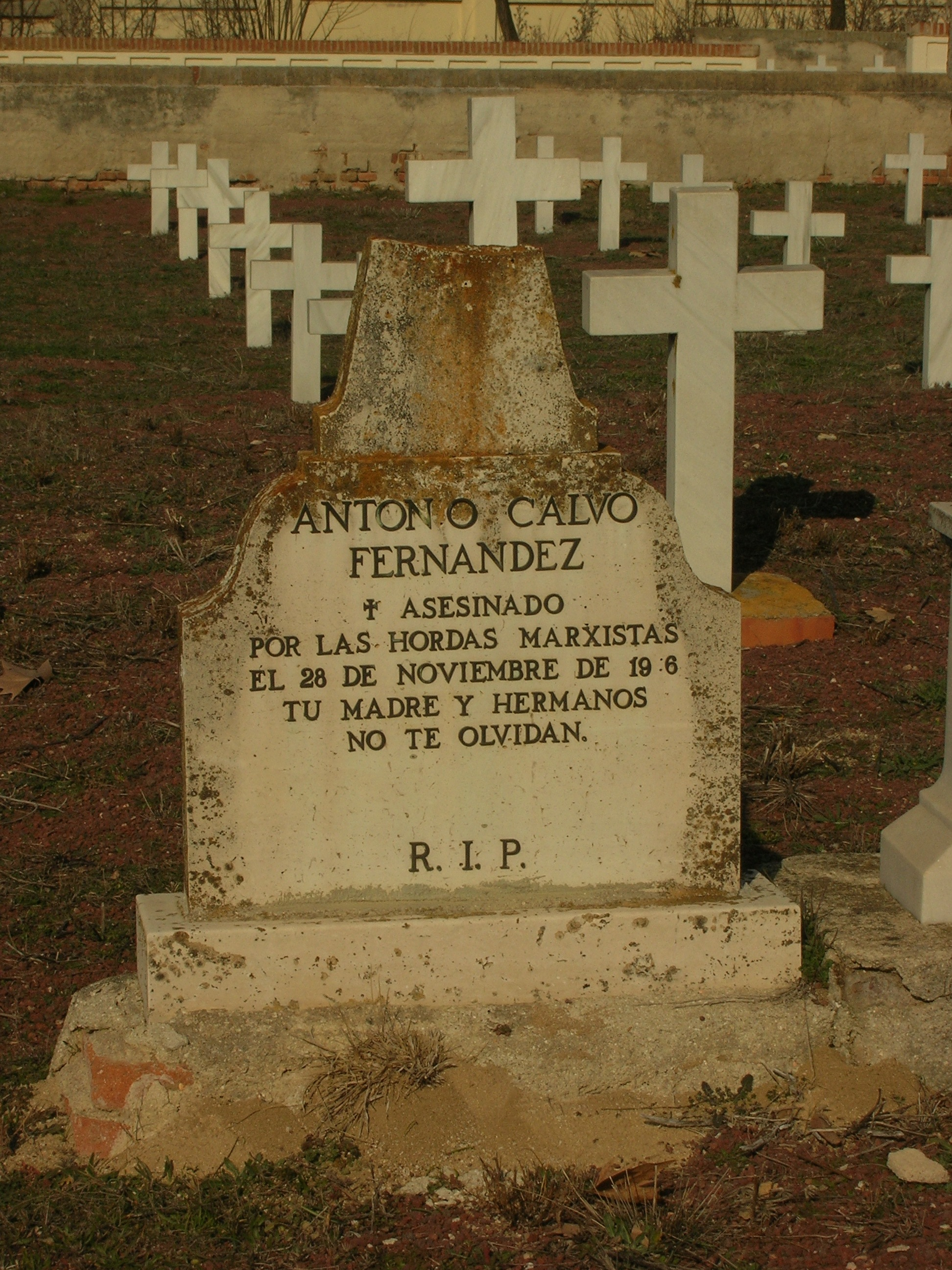 Detalle de una lápida mortuoria en la Fosa IV del cementerio de las Matanzas de Paracuellos. Aunque la mayor parte de las lapidas que se sencuentran en el lugar son sencillas cruces blancas anónimas, sin inscripción alguna, entre las que llevan inscripciones son muy escasas las que, como en la imagen, emplean un lenguaje acusatorio y porpagandistico propio del contexto del momento de los hechos.